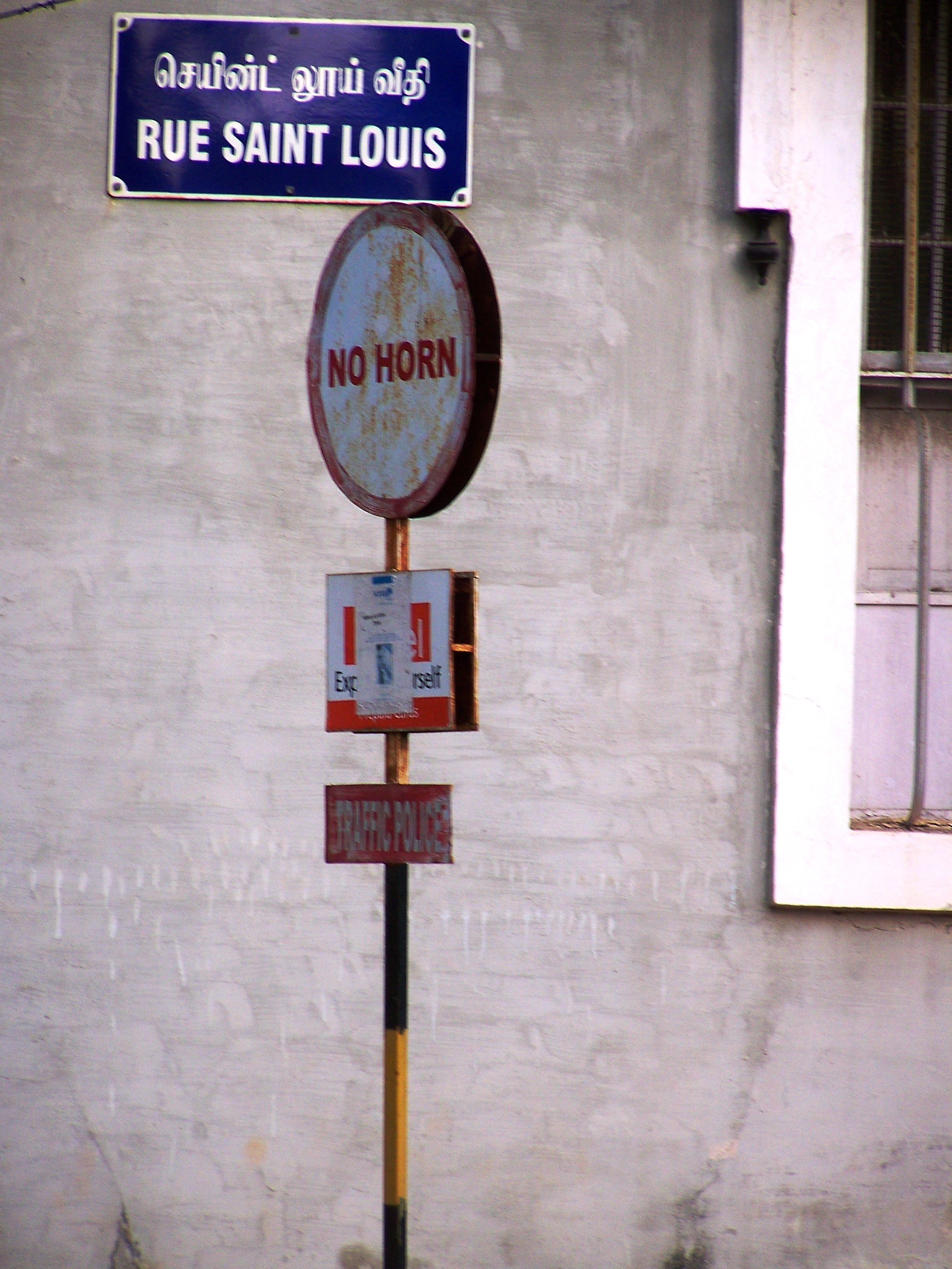 Panneaux trilingue Tamoul-Français-Anglais à Pondichery